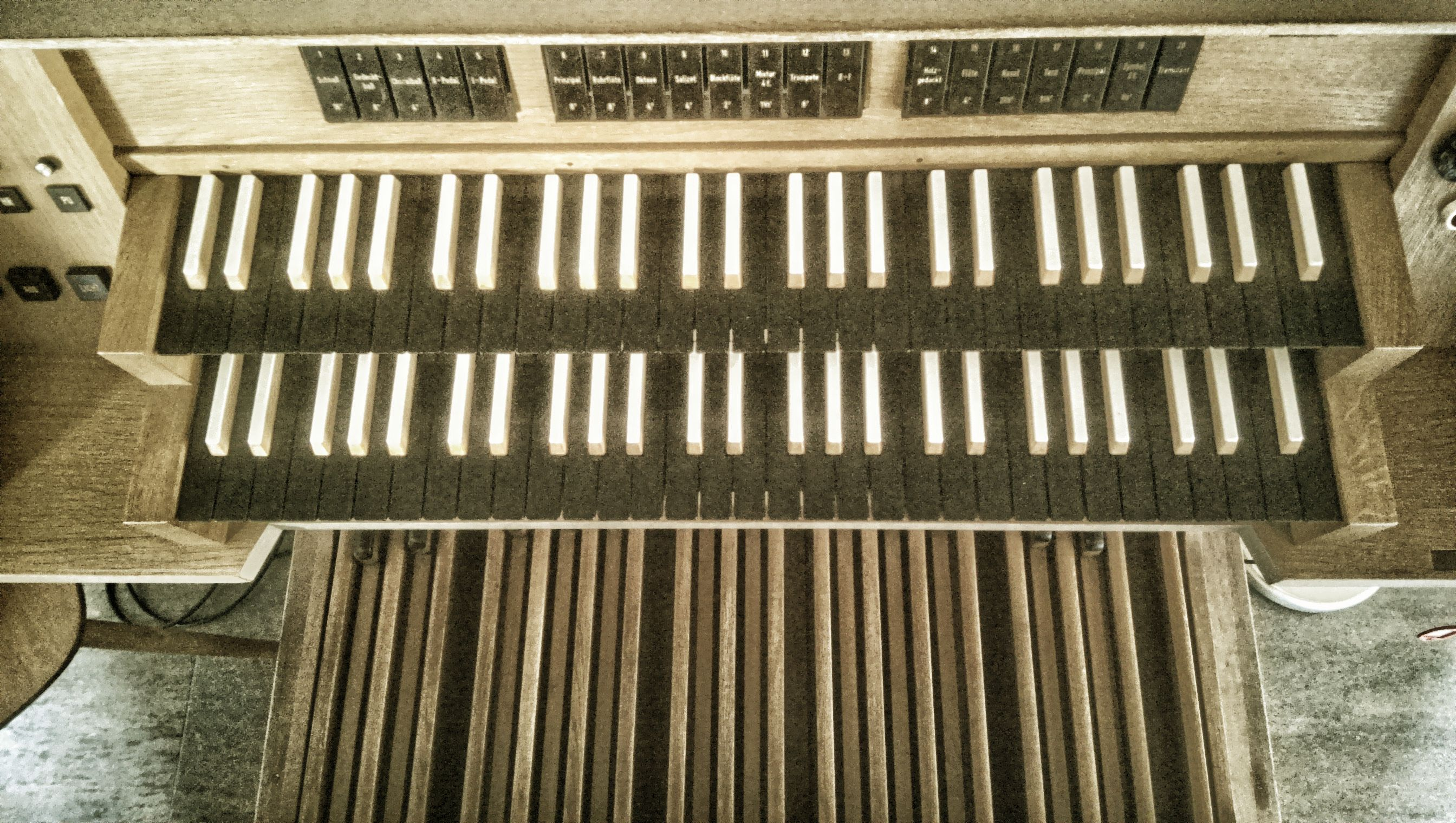 Blick auf beide Manuale und Pedal